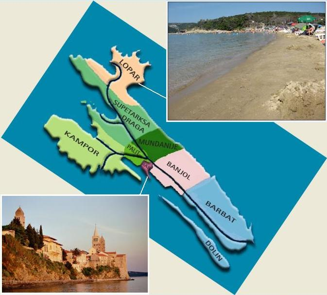 Carta turistica di Arbe e due panoramiche sull'Isola